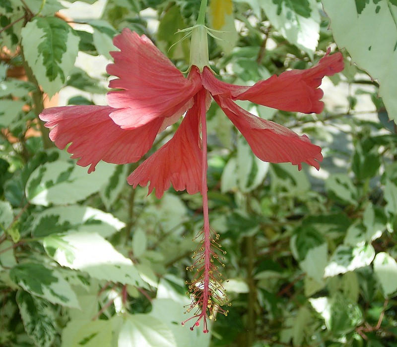 Hibiscus rosa-sinensis